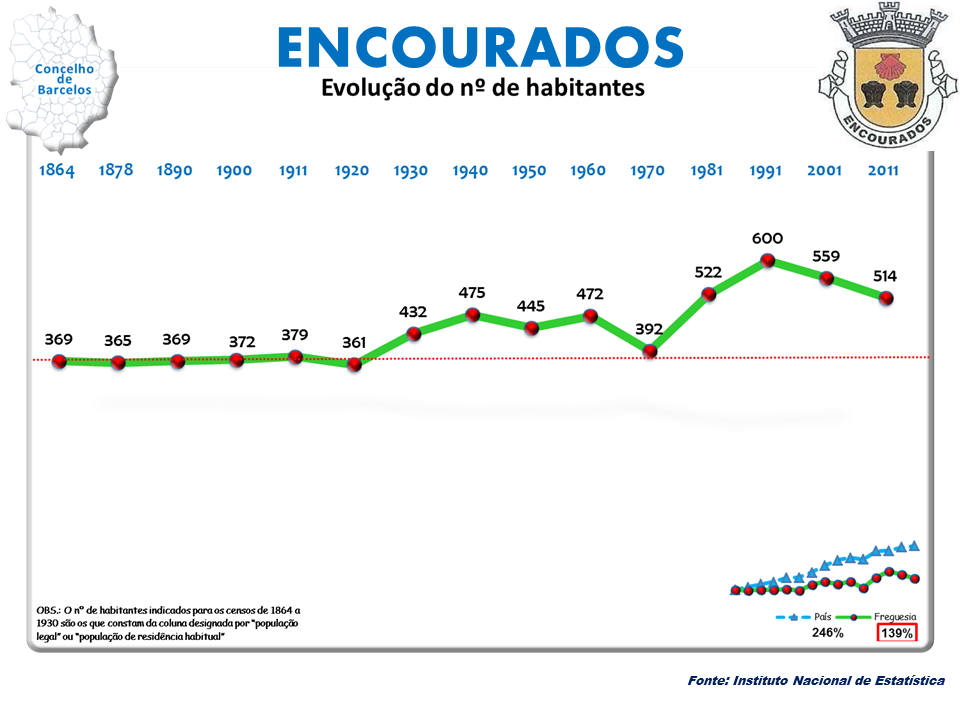 anos1864/2011